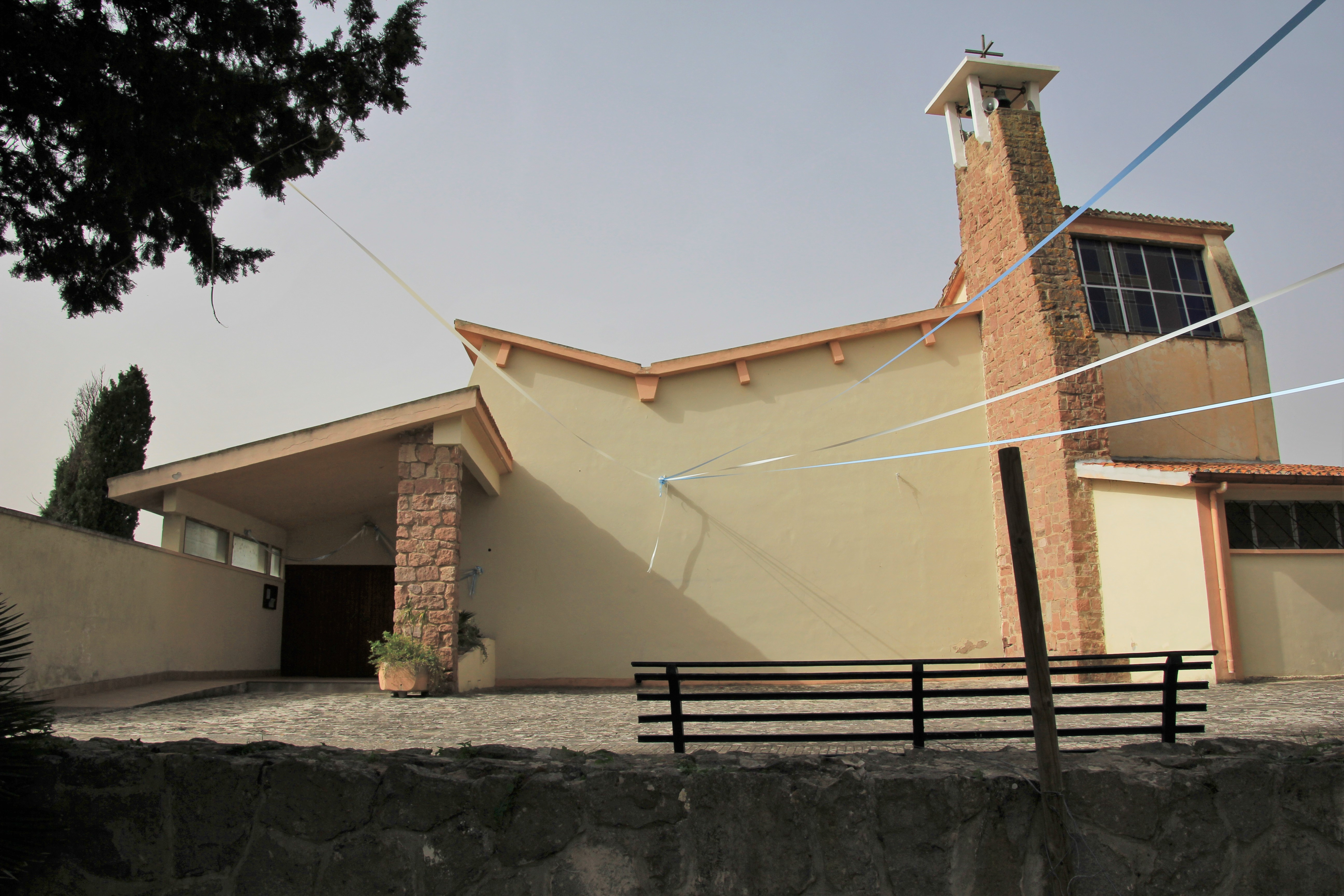 Sassari, Tottubella, chiesa di Stella Maris